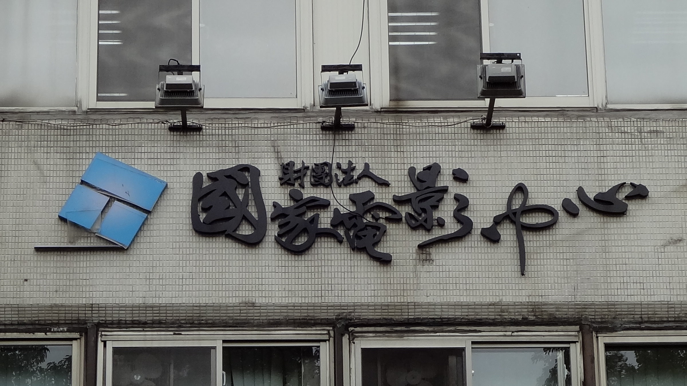 財團法人國家電影中心，位於臺北市中正區青島東路7號4樓（國泰建設青島大廈）。